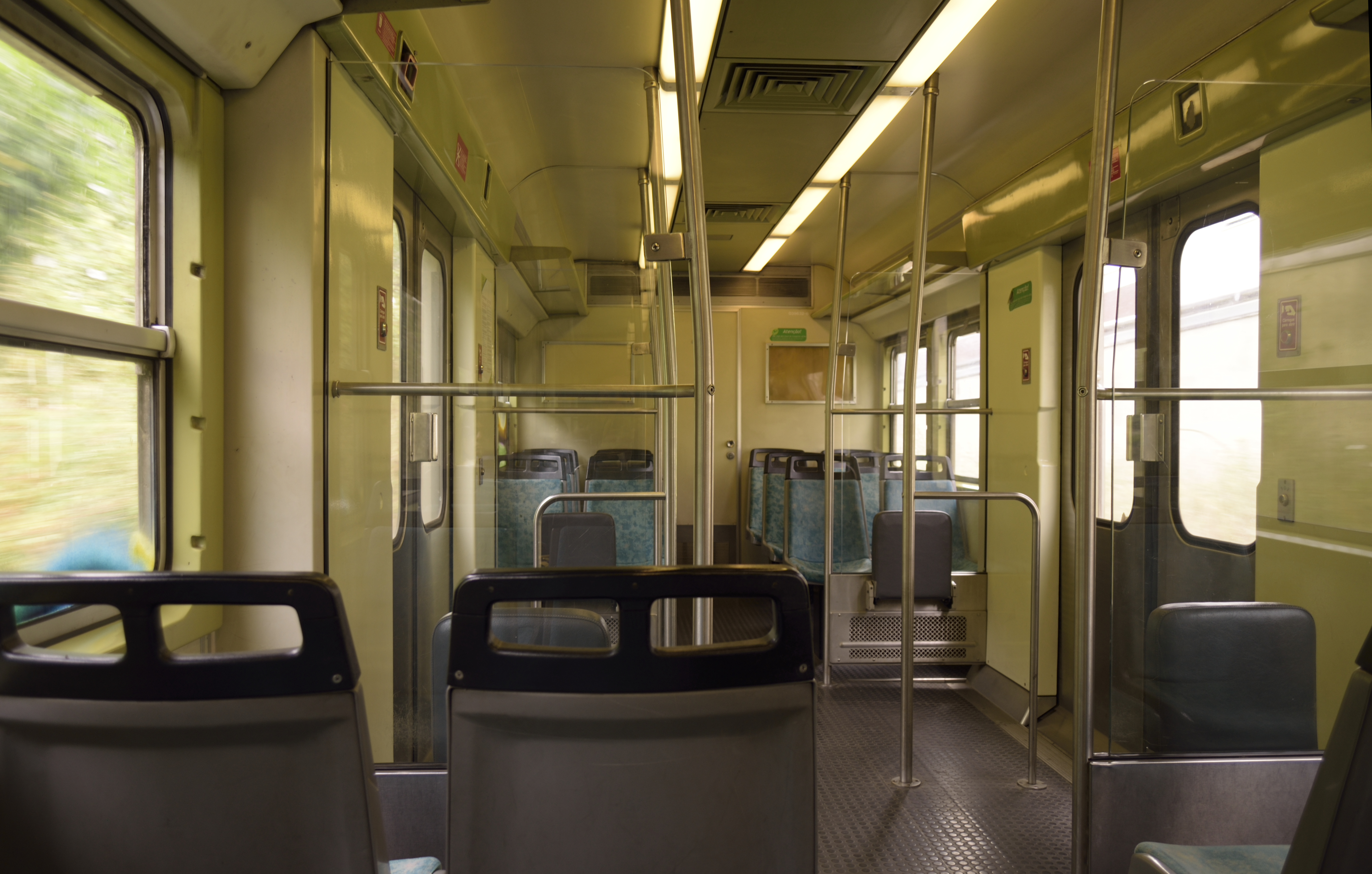 _DSC2455